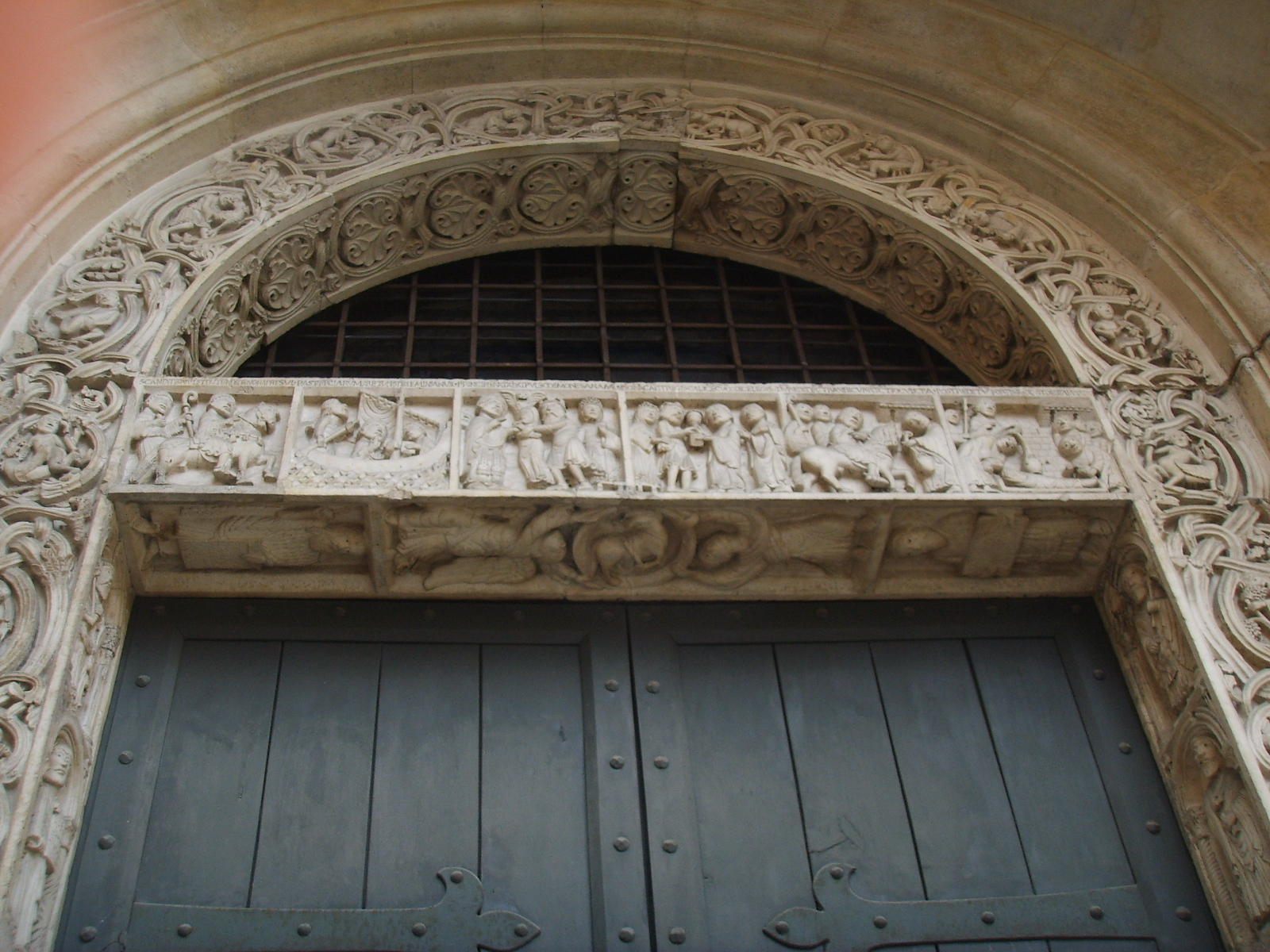 duomo di modena